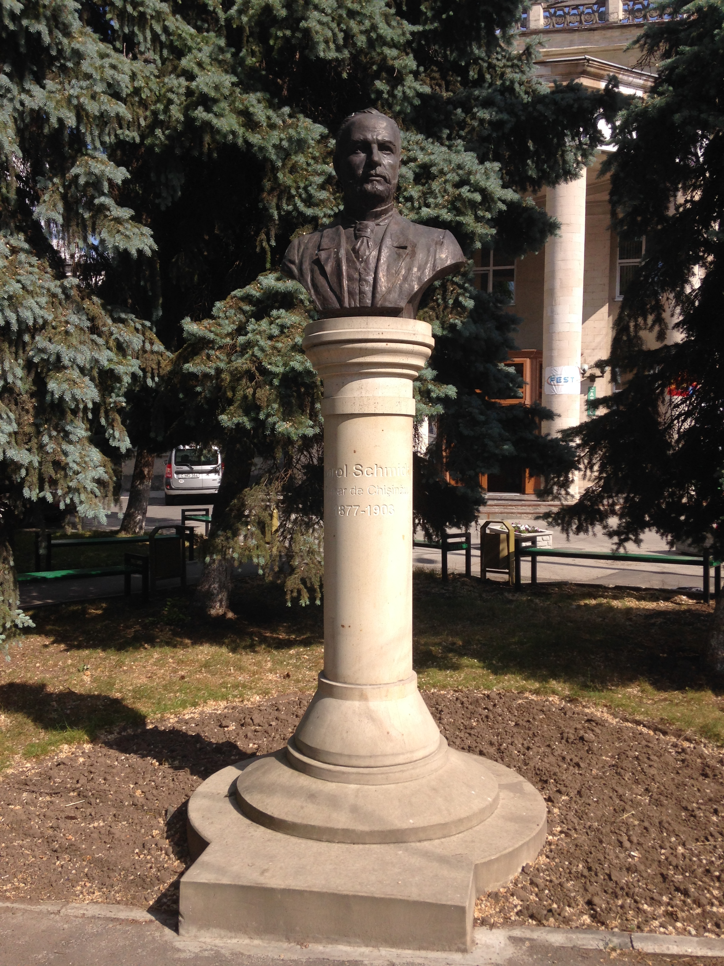 Bustul lui Carol Schmidt din fața Filarmonicii Naționale "Serghei Lunchevici"